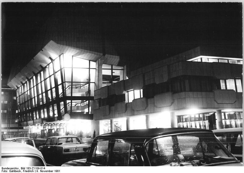 Leipzig, "Neues Gewandhaus", Nacht ADN-ZB Gahlbeck 9.11.81 Leipzig: Das neue Gewandhaus am Karl-Marx-Platz in Leipzig hatte in knapp vier Wochen seit der Eröffnung 50.000 Gäste. 27 Konzerte sowie Stunden der Orgelmusik zogen die Musikfreunde in ihren Bann. (siehe 13N)